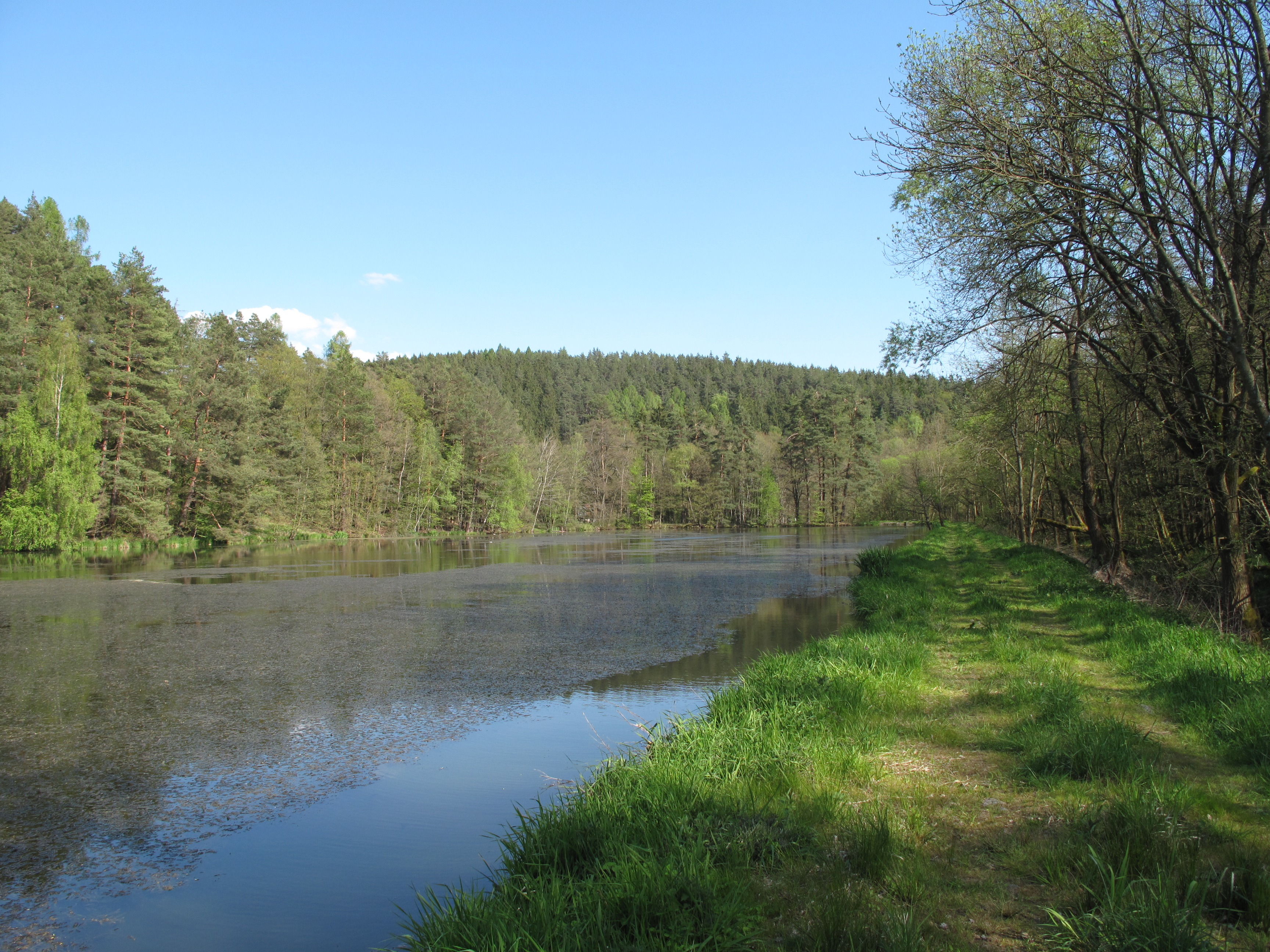 Rybník Šáchovec na Jevanském potoce. Okres Praha-východ, Česká republika.